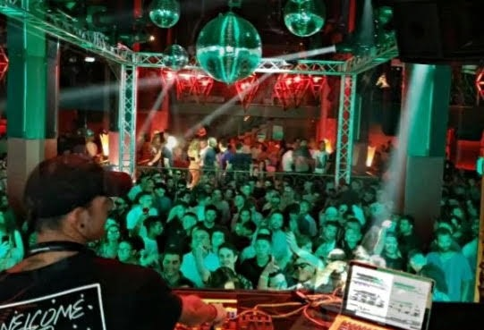 DJ y productor español de música tech-house, Guille Placencia, en el Main Room del Club Vértigo en San José de Costa Rica. Agosto de 2019.